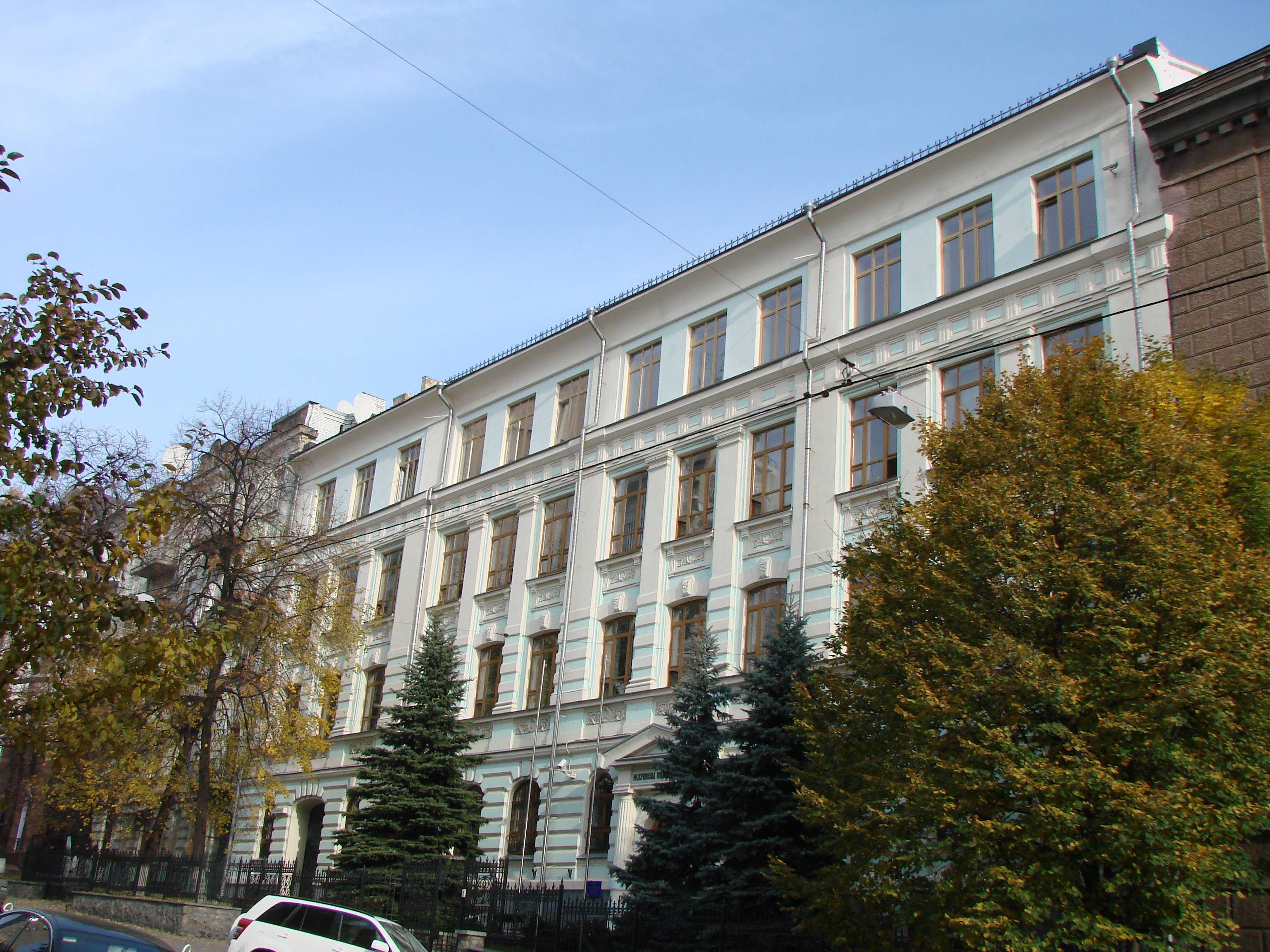 Гімназія Дучинської О. Т., Київ, Коцюбинського Михайла вул., 7